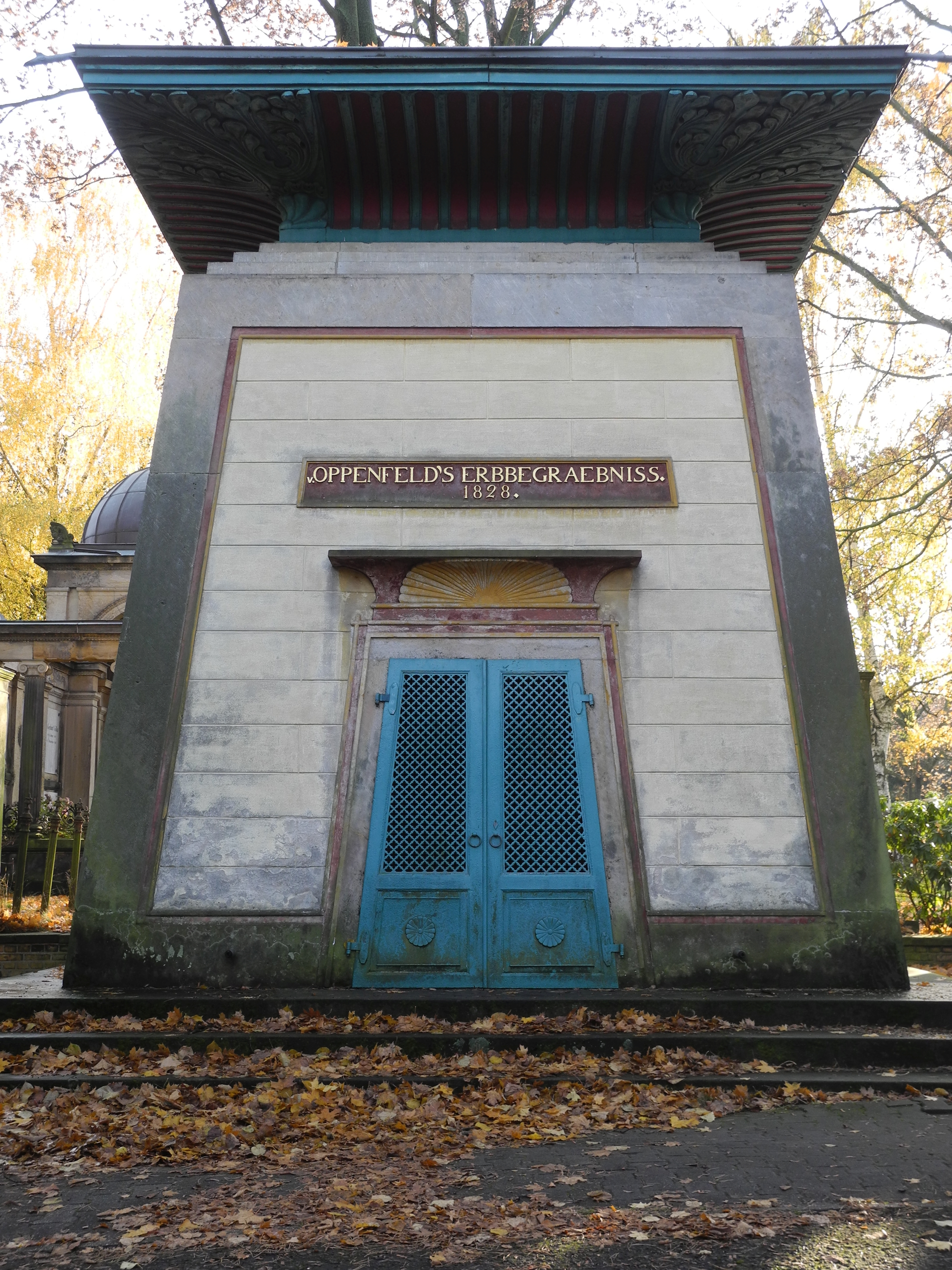 Mausoleum der Famile von Oppenfeld Dreifaltigkeitskirchhof II, Berlin-Kreuzberg, Bergmannstraße neuägyptischer Stil, neo-ägyptischer Stil, Ägyptizismus, Egyptian Revival Style Aufnahme vom 06. November 2016